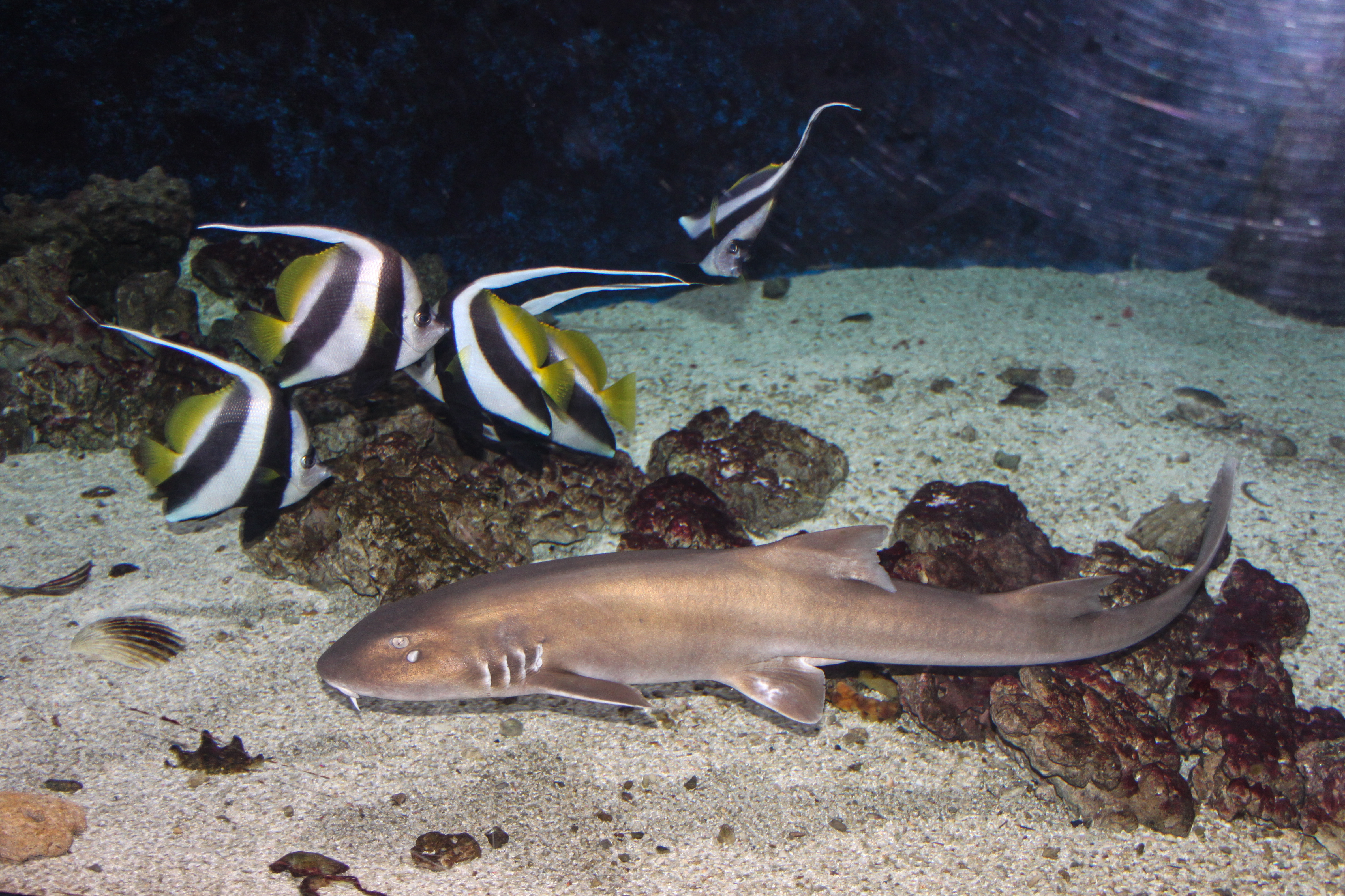 Nyíregyháza Zoo, Oceanarium, Chiloscyllium punctatumlabel QS:Len,"Nyíregyháza Zoo, Oceanarium, Chiloscyllium punctatum" label QS:Lhu,"Nyíregyházi Állatpark, ócenárium, bambuszcápa"